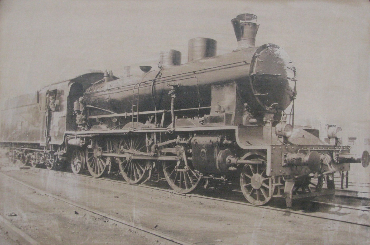 Parna lokomotiva JŽ serije 1. Fotografija iz Tehničkog muzeja u Zagrebu